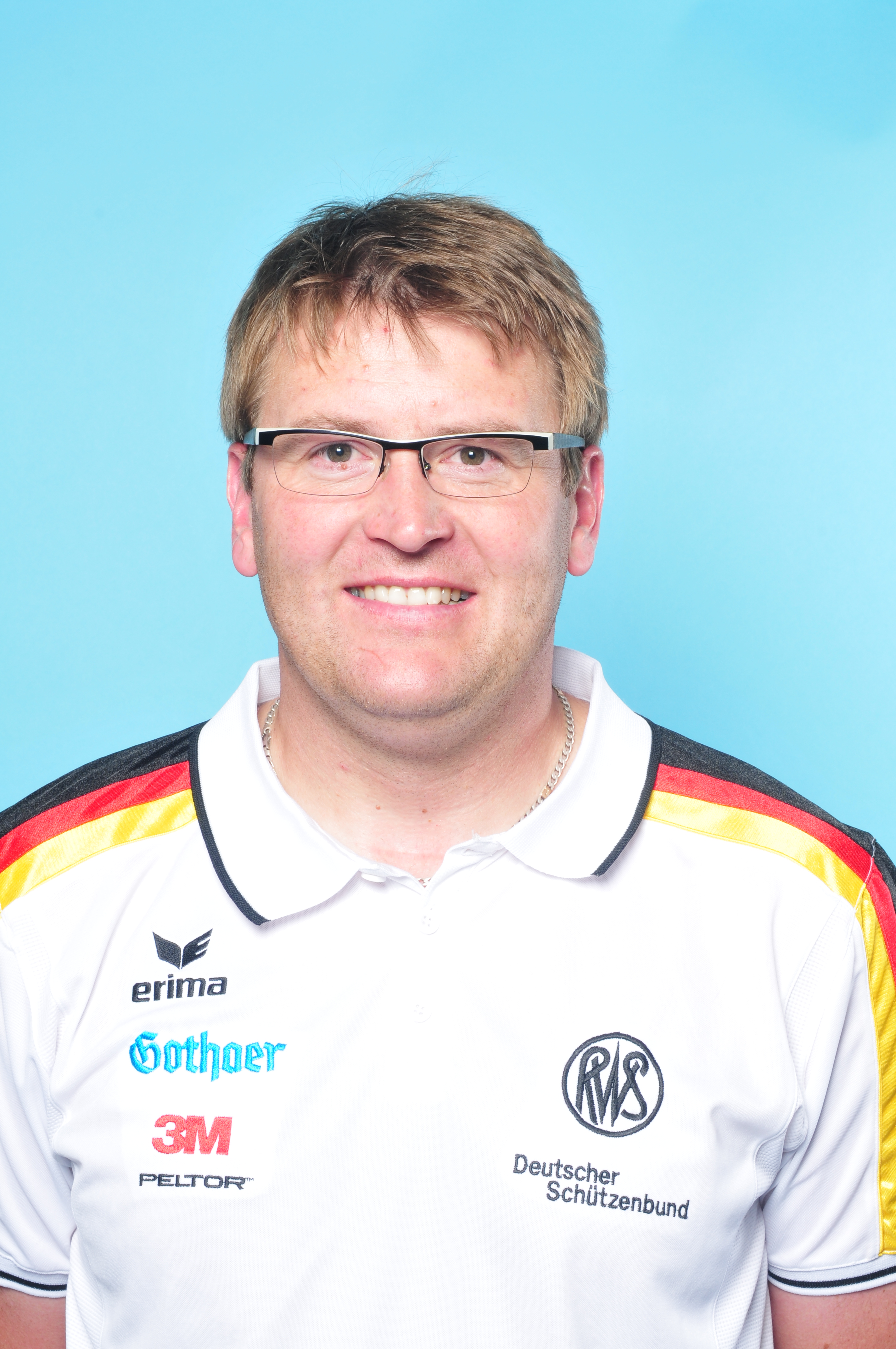 Einkleidung der deutschen Olympiamannschaftam 28. Juni 2012 in Mainz - Olympische Sommerspiele 2012 Cirdan Marcus Cyron Olaf Kosinsky Ralf Roletschek Sven Teschke